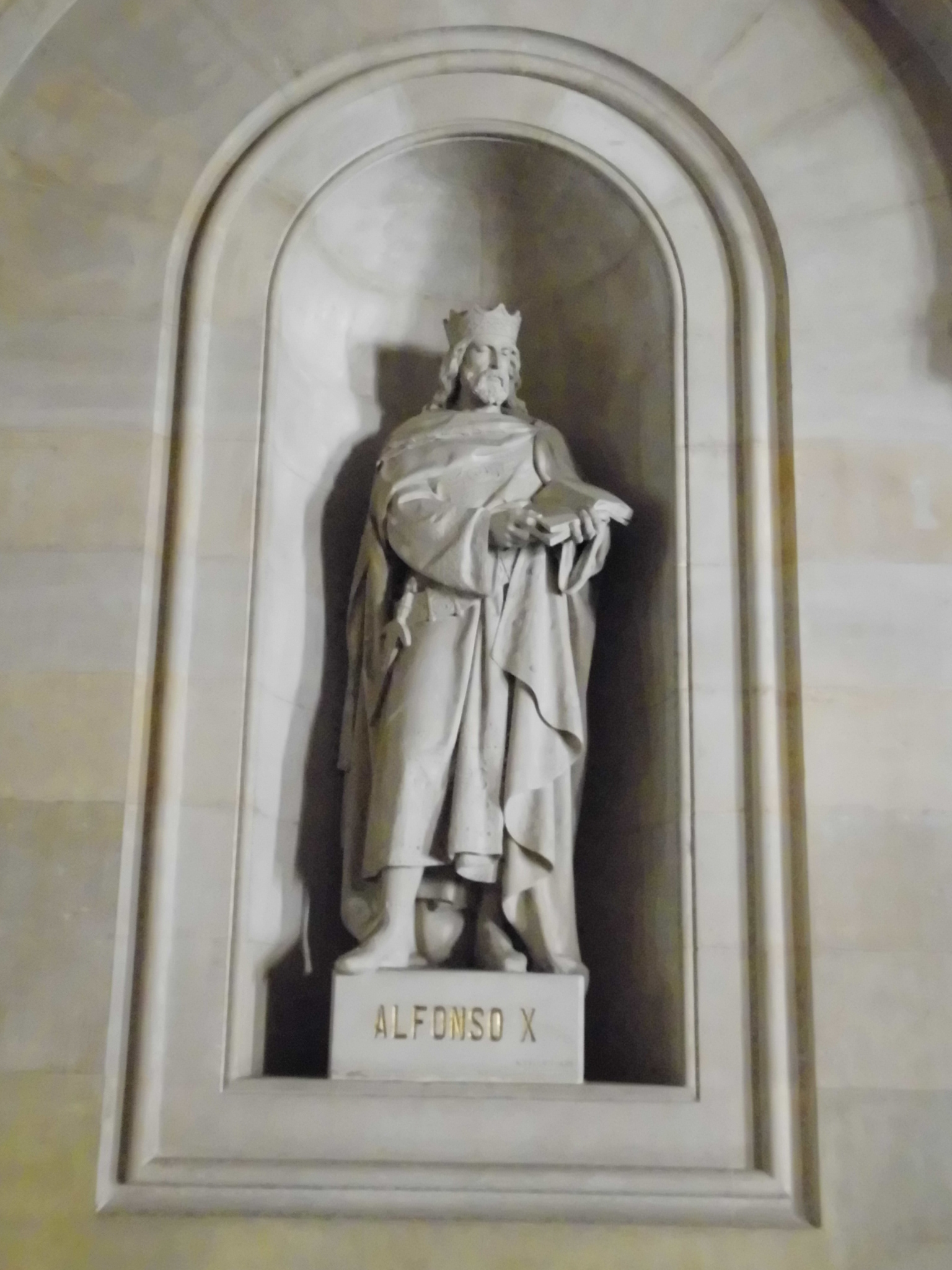 Alfons X (Agapit Vallmitjana). Gran Via de les Corts Catalanes, 585 (Vestíbul de la Universitat) (Barcelona)